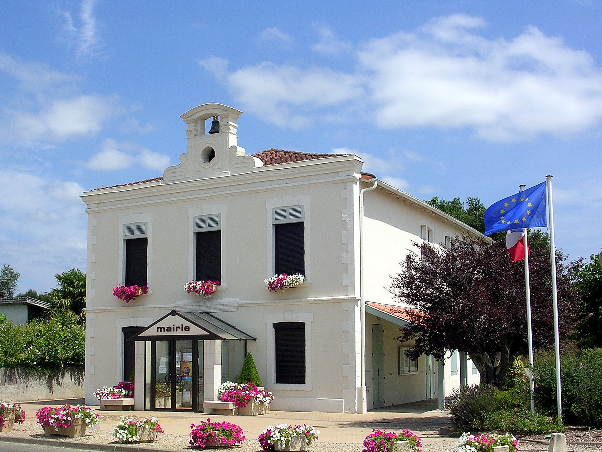 Mairie de Benquet (Landes, France)